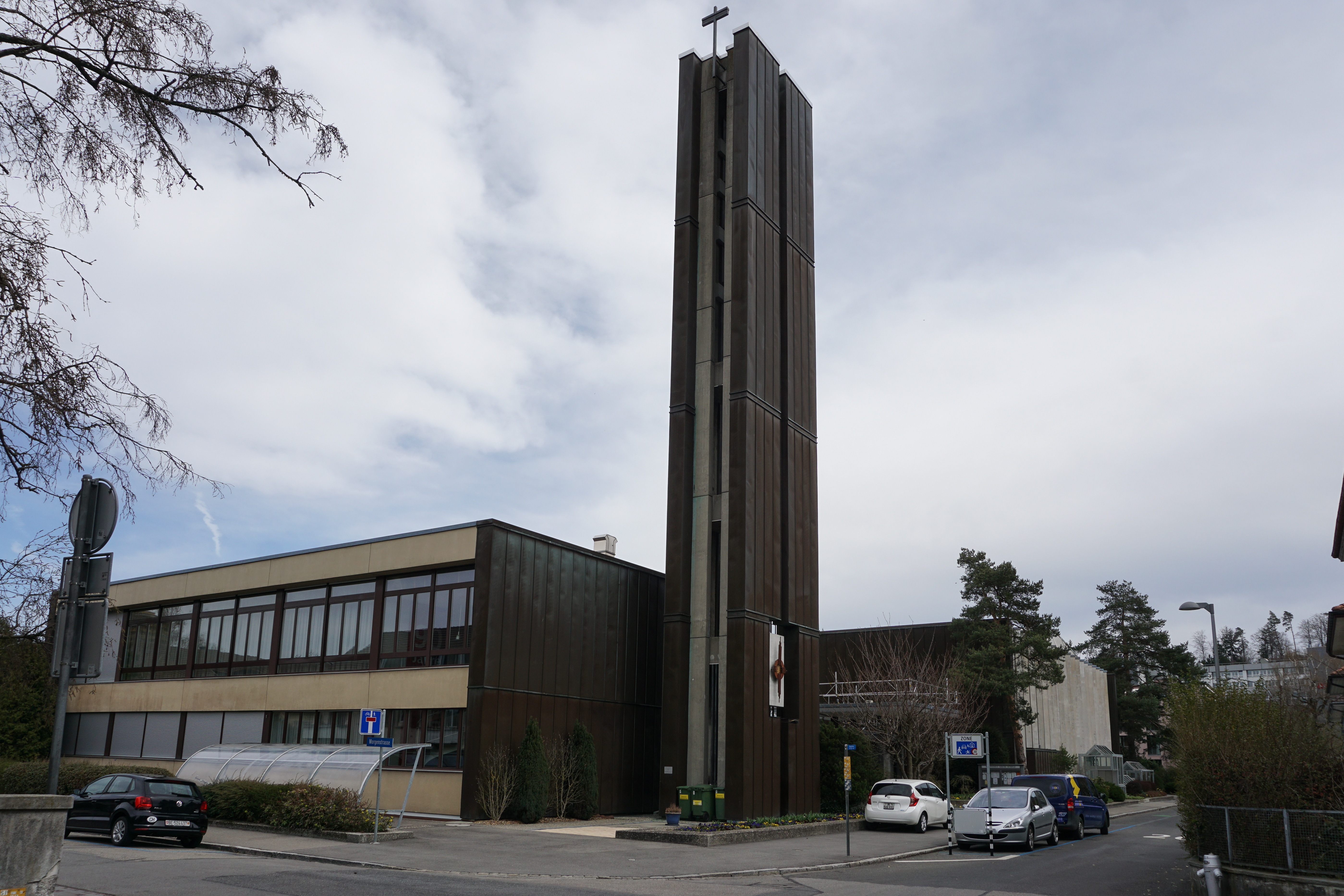 Römisch-katholische Kirche St. Antonius von Padua, Bern-Bümpliz, Westecke mit Turm